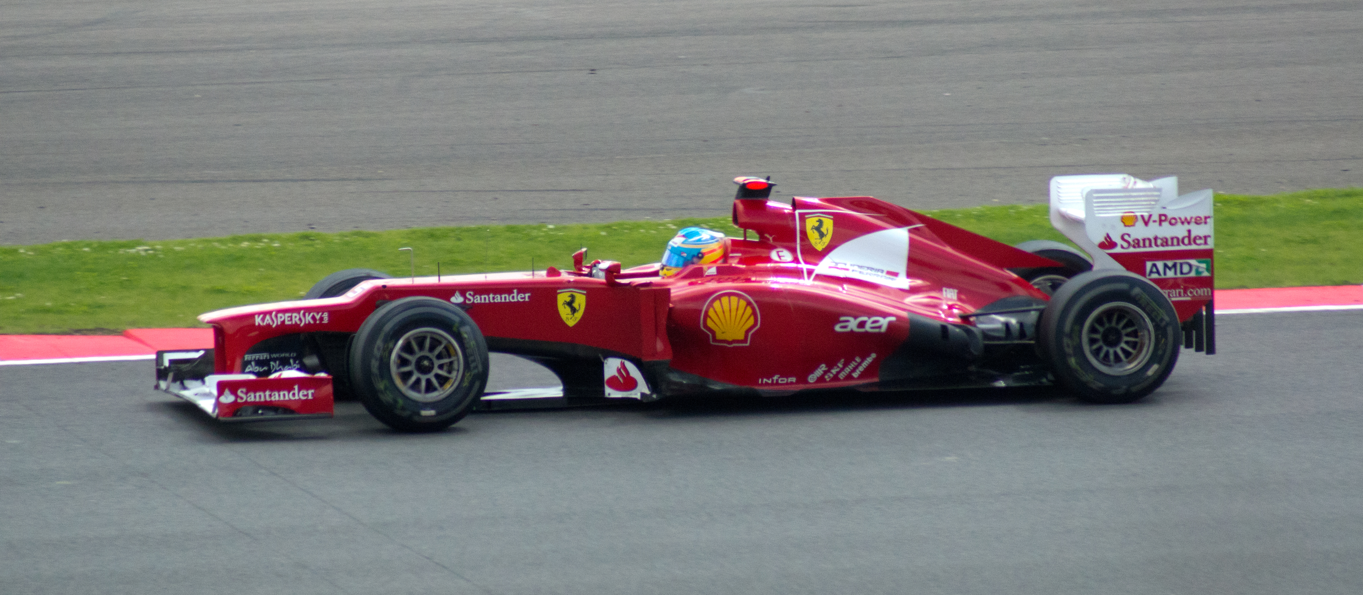 Fernando Alonso lors du Grand Prix de Grande-Bretagne 2012 sur Ferrari F2012.